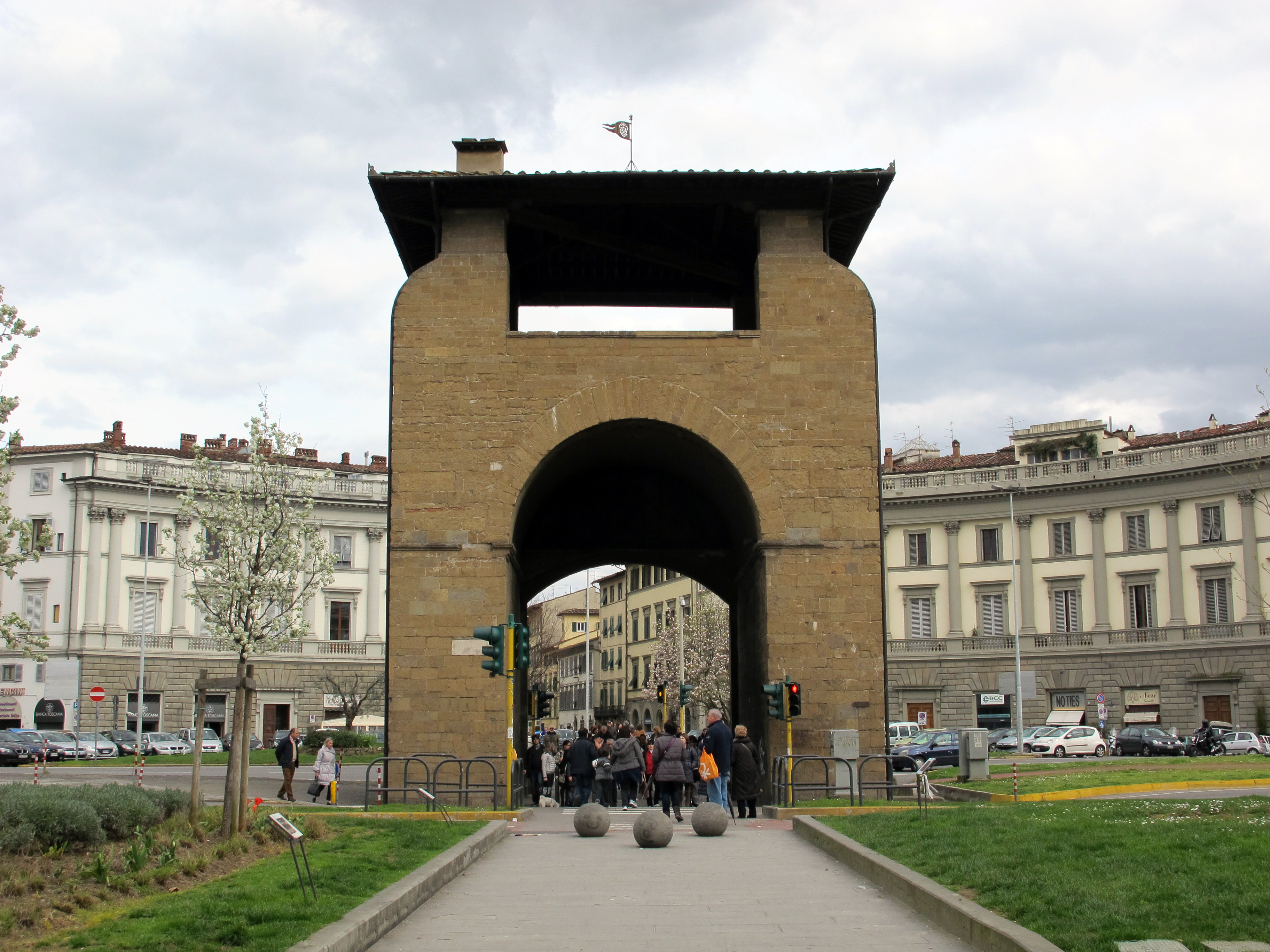 Firenze